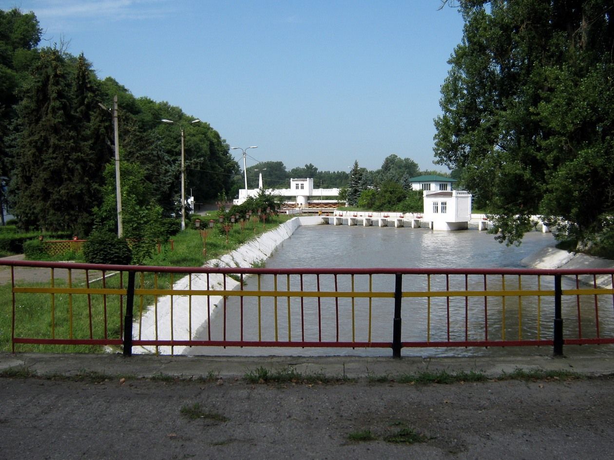 Вид у въезда в посёлок Джулат и Малокабардинский канал